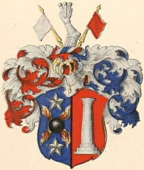 Rudeni suguvõsa aadlivapp